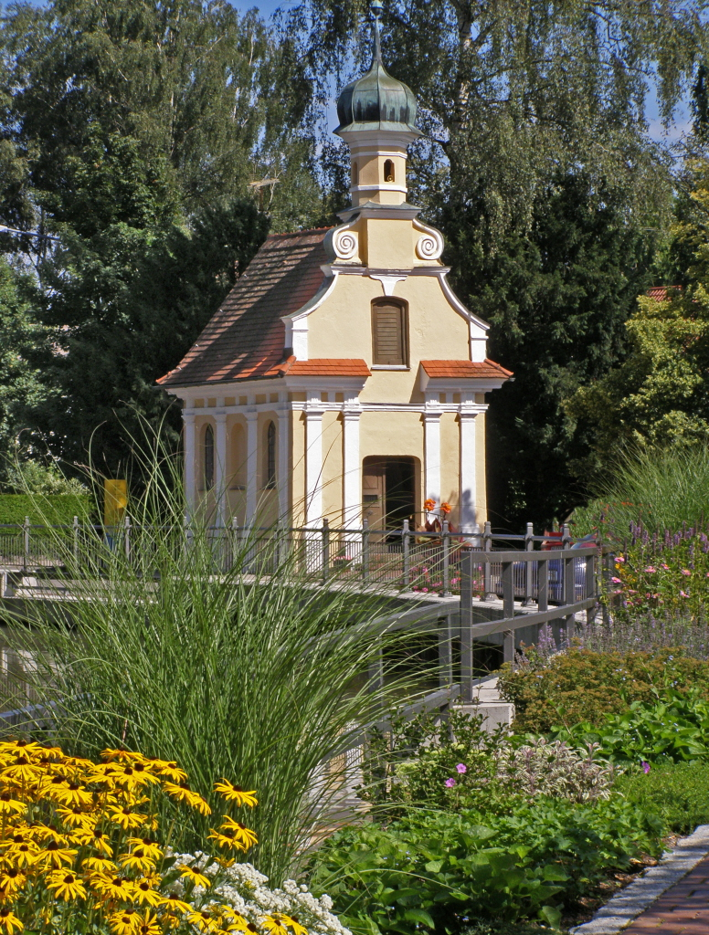 Krumbach (Schwaben) - Mühlenkapelle